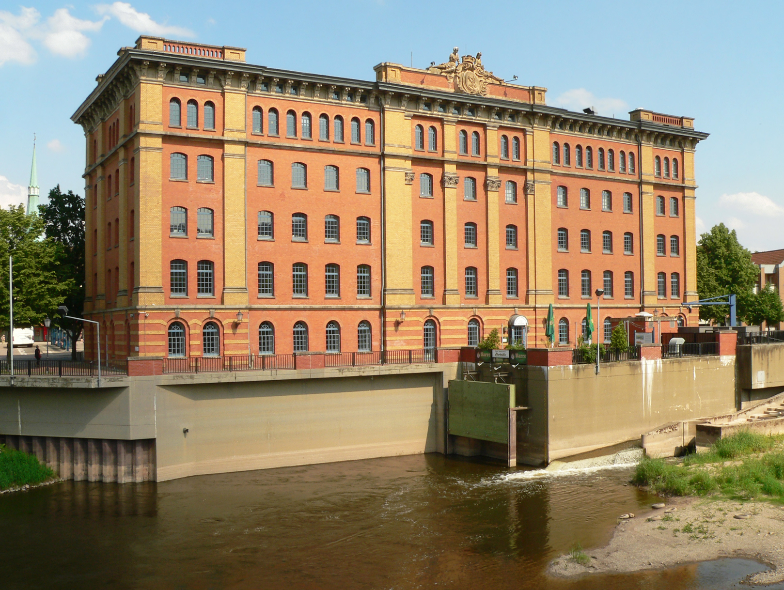 Pfortmühle